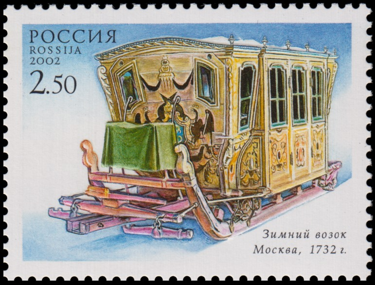 Почтовая марка России из серии «Старинные экипажи», выпущенная 25 июля 2002 года. Зимний возок 1732 года, связан с именами российских царствующих особ Анны Иоанновны и Елизаветы Петровны. Хранится в коллекции Оружейной палаты Государственного историко-культурного музея-заповедника «Московский Кремль». Художник марки — Л. Зайцев, номер по катологу ЦФА — 763. Согласно описанию на сайте Оружейной палаты на возке имеется вензель Елизаветы Петровны.